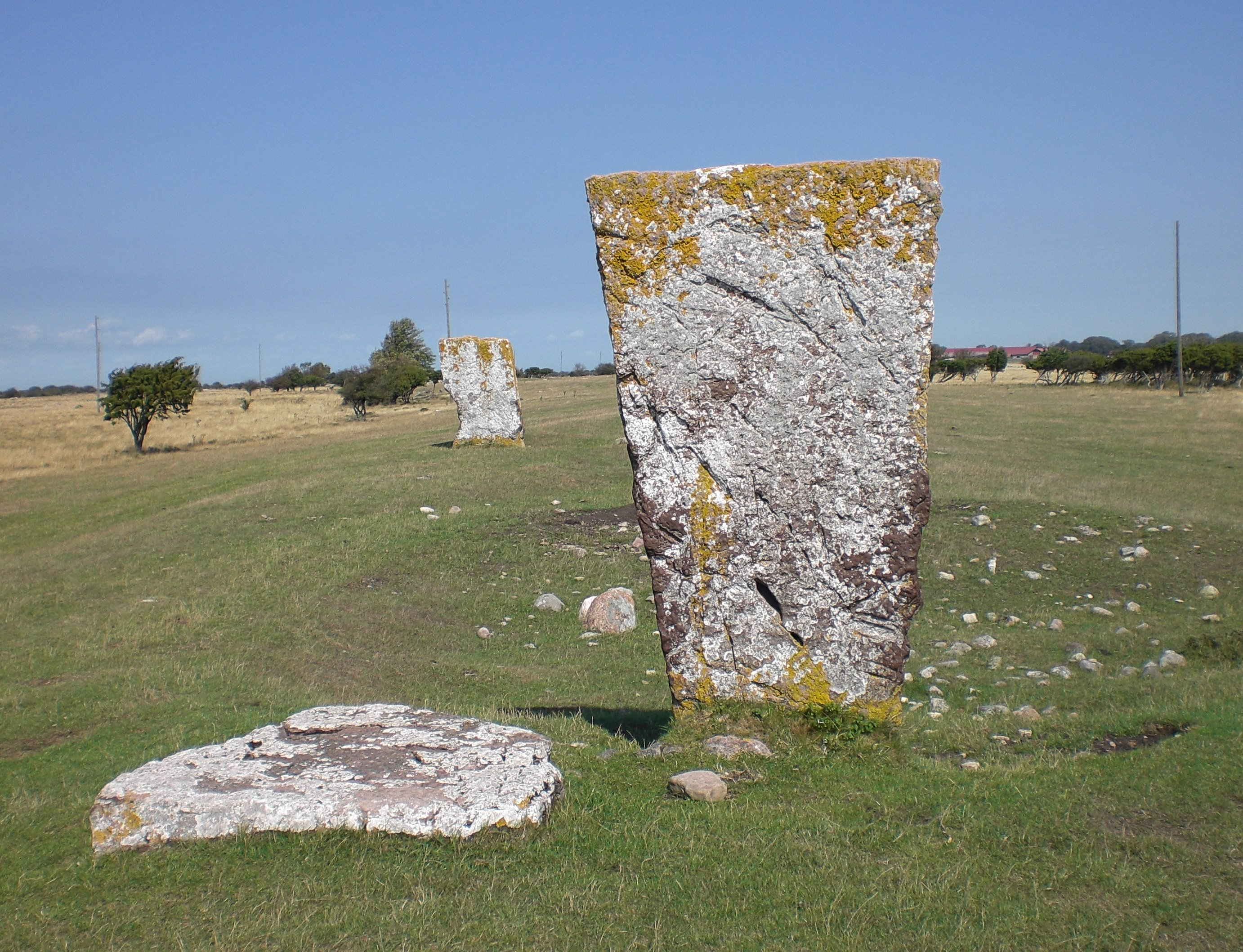 Kungstenarna im Süden Ölands